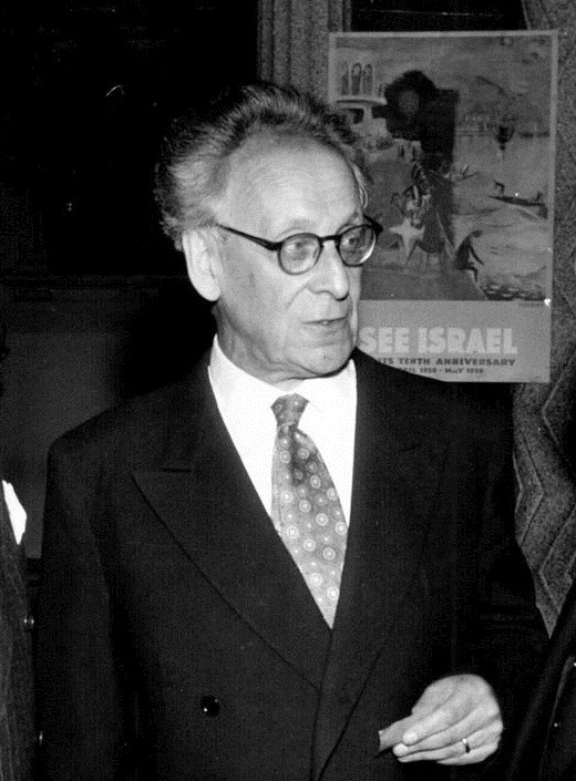 Staten Israels 10-årsjubileum högtidlighölls i Blå hallen i Stockholm på söndagskvällen. Hallen, som smyckats med Israels och Sveriges flaggor, var gott och väl fullsatt när professor Hugo Osvald, som är ordförande i samfundet Sverige–Israel, läste upp ett telegram från president Ben Zvi och tolkade en proklamation från premiärminister Ben-Gurion, som skissade på ett nytt 10-årsprogram.På bilden ses professor Hugo Valentin.